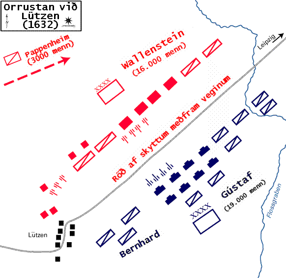 Þessi mynd er búin til af mér, Vésteini Valgarðssyni, upp úr sams konar mynd með ensku greininni um orrustuna við Lützen. Þá mynd er að finna á þessari síðu: og bein slóð á hana er hér: Breytingin fólst einkum í því að setja íslenskan texta inn á hana. Myndin eins og hún birtist með ensku færslunni er á "public domain" skv. upplýsingum sem fylgja henni þar, en þar kemur einnig fram að upprunalega komi hún frá Sagnfræðideild West Point-skólans, sem er herskóli rekinn af bandaríska hernum. Vesteinn 05:51, 10 maí 2007 (UTC)